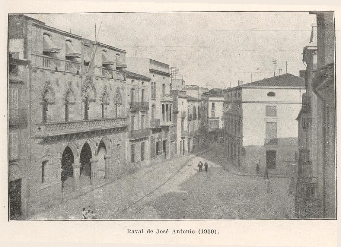 Catalunya, Terrassa, Raval Jose Antonio, 1930.